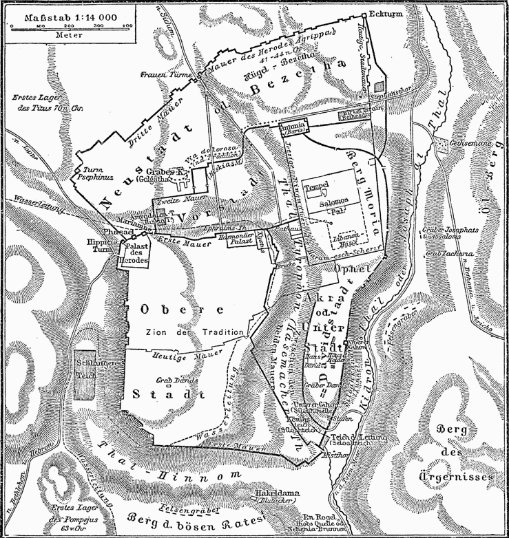 Plan des alten Jerusalem.